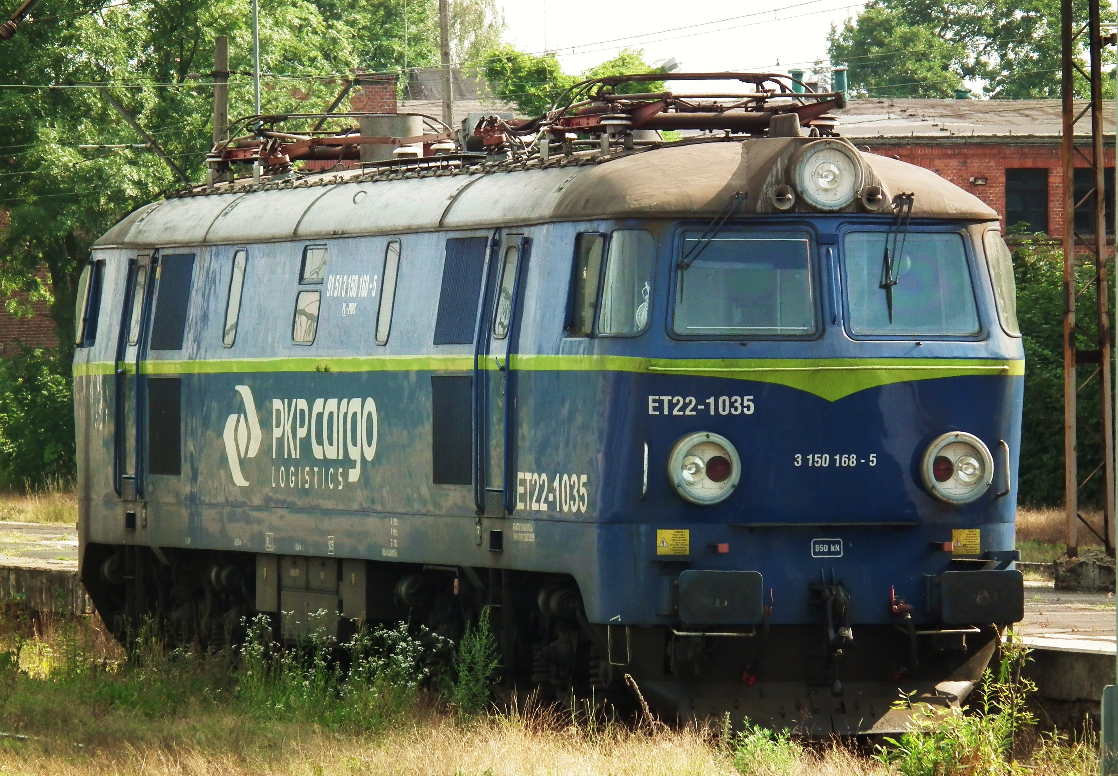 Tychy. ET22-1035.